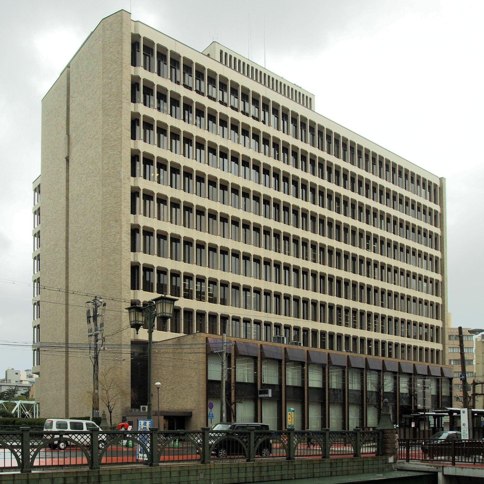 長崎県長崎市の地方銀行｢十八銀行｣の本店ビルディング Zoner Photo Studio 11にて補正